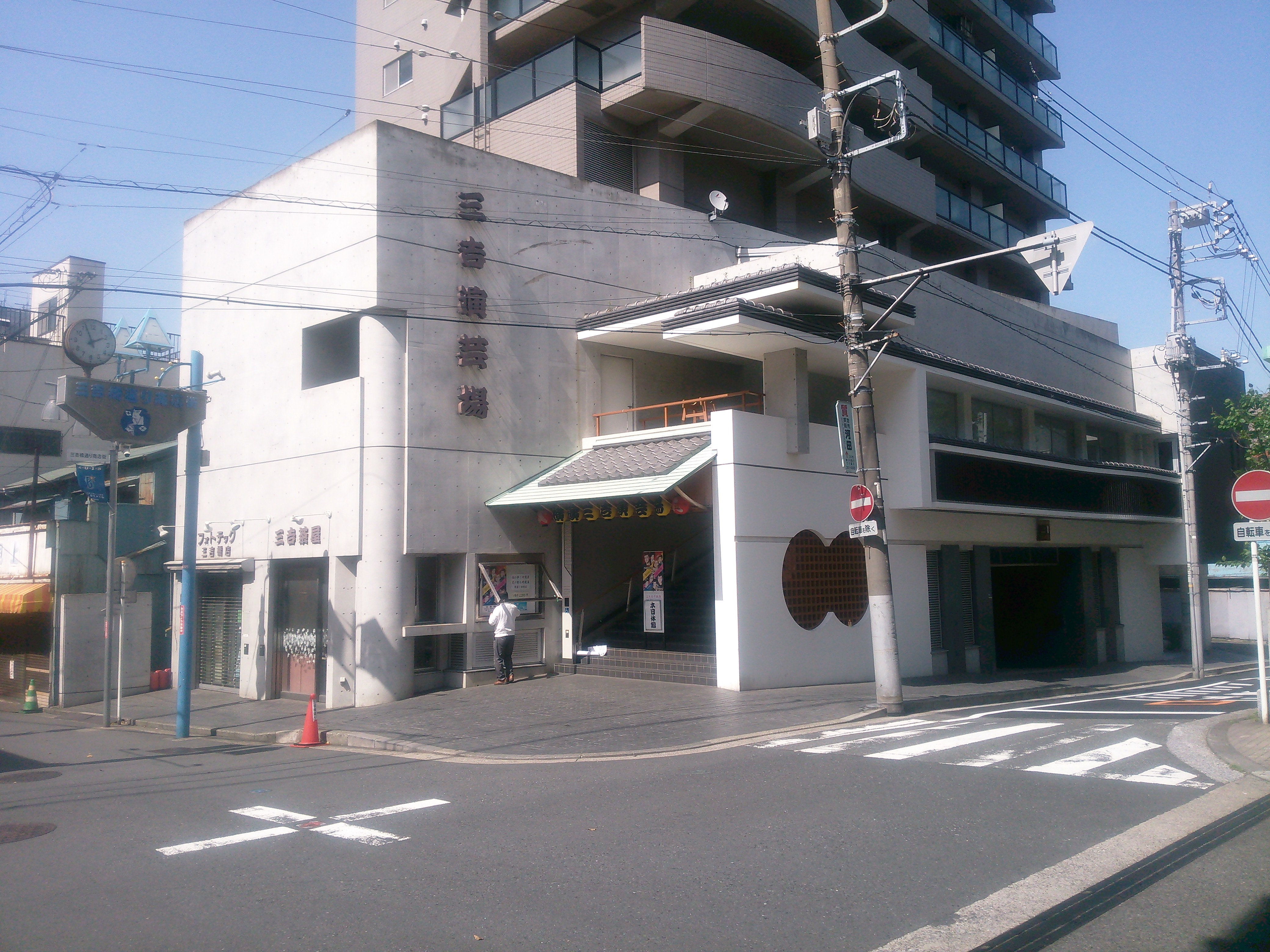 横浜市南区、三吉演芸場